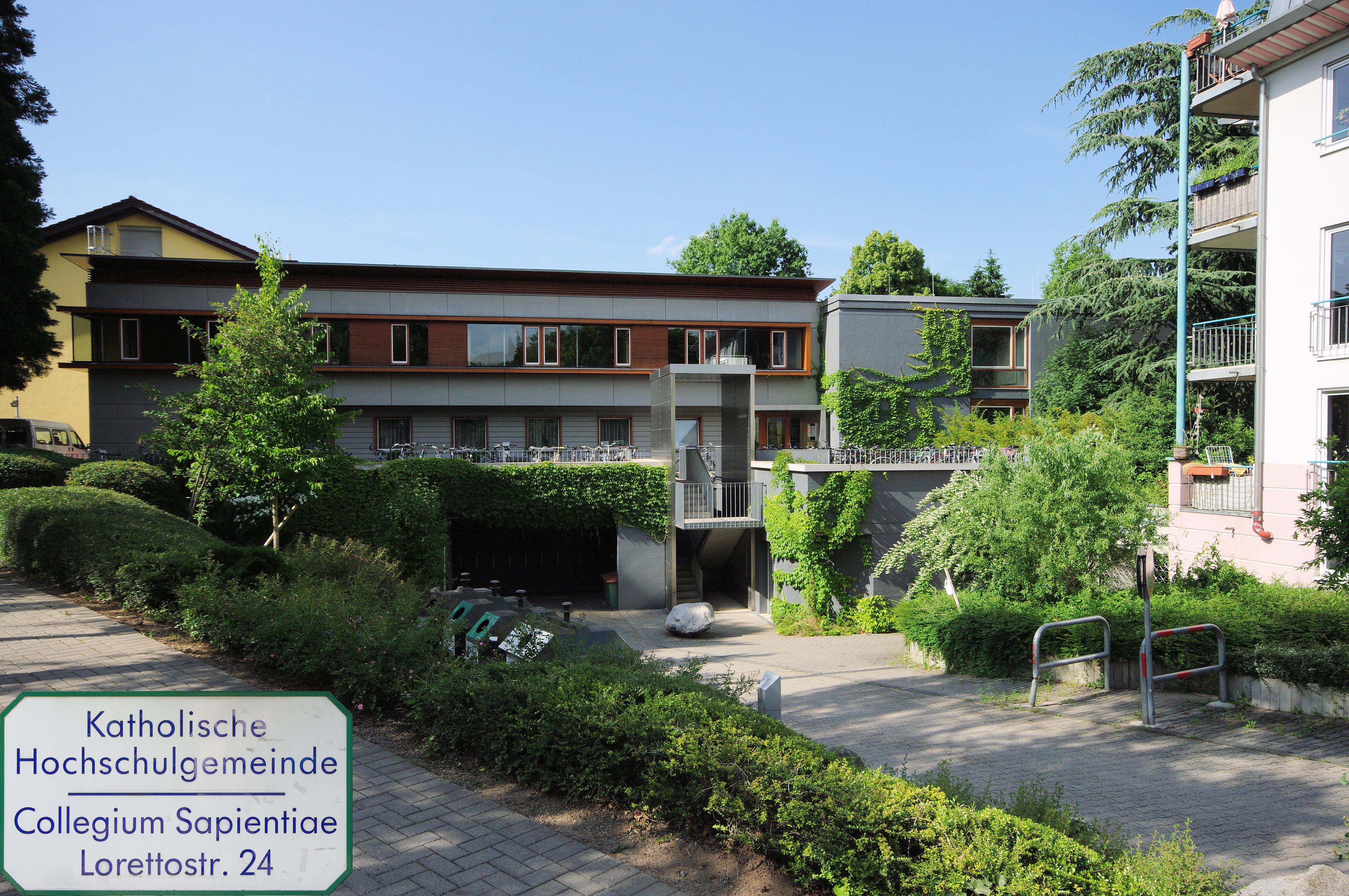 Das Collegium Sapientiae (lat., „Kolleg der Weisheit“), auch Sapienz genannt, ist das älteste Studentenwohnheim in Freiburg im Breisgau.